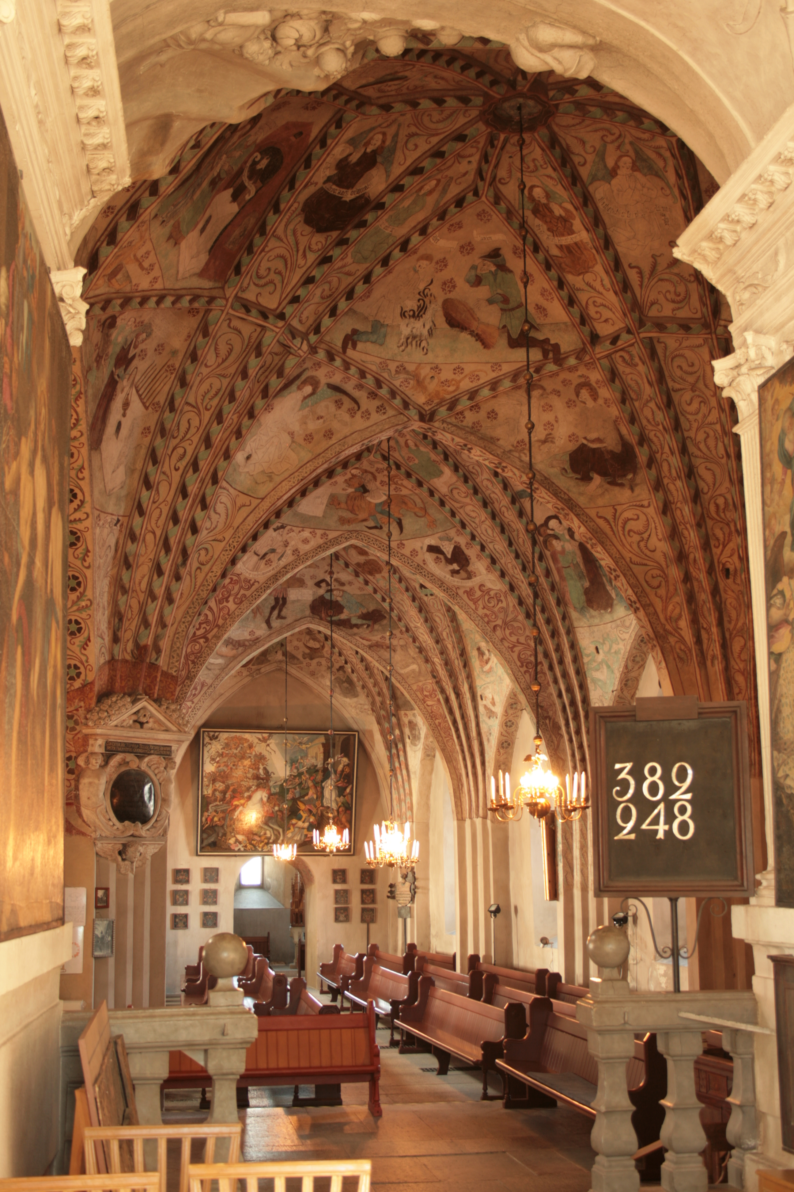 Högra sidan.